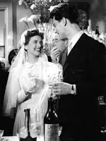 Giovanna Ralli e Gabriele Tinti in "Anni facili" (Zampa, 1953)